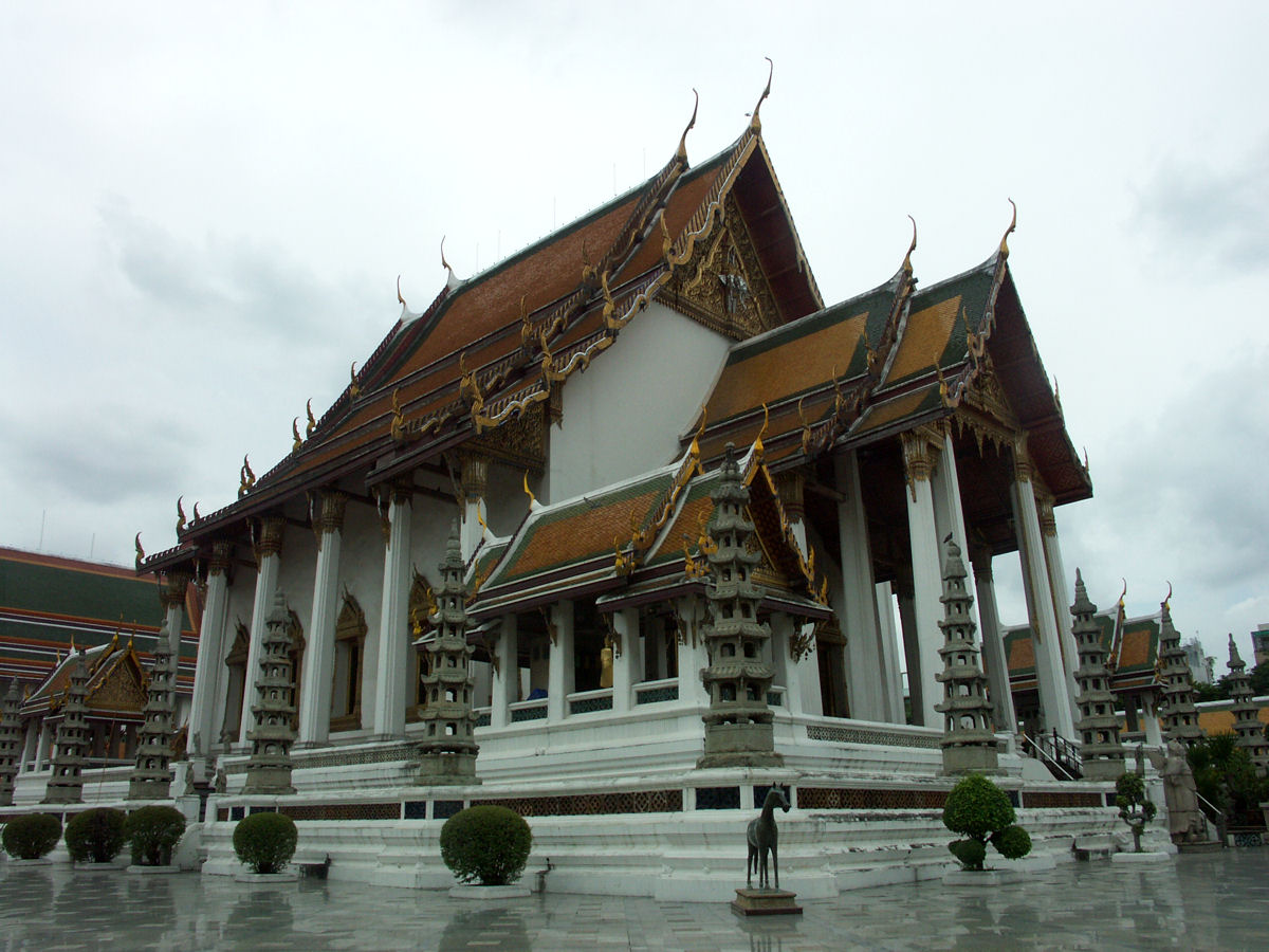 Wat Suthat, Bangkok, Thailand